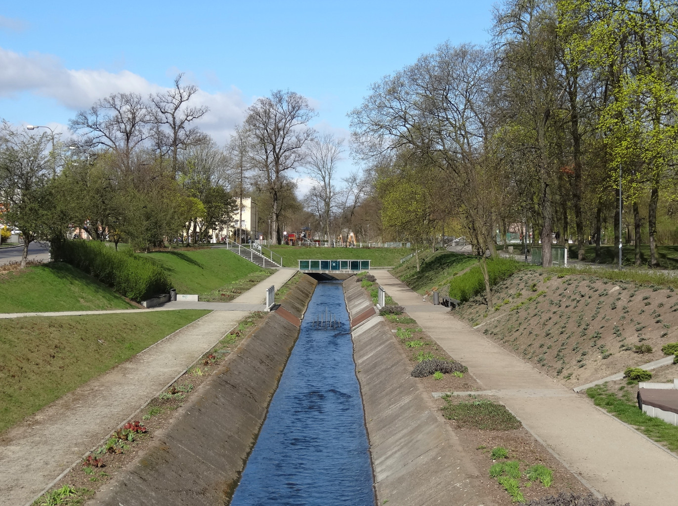 Planty nad Kanałem Bydgoskim, cześć wschodnia przebudowana w 2012 r.